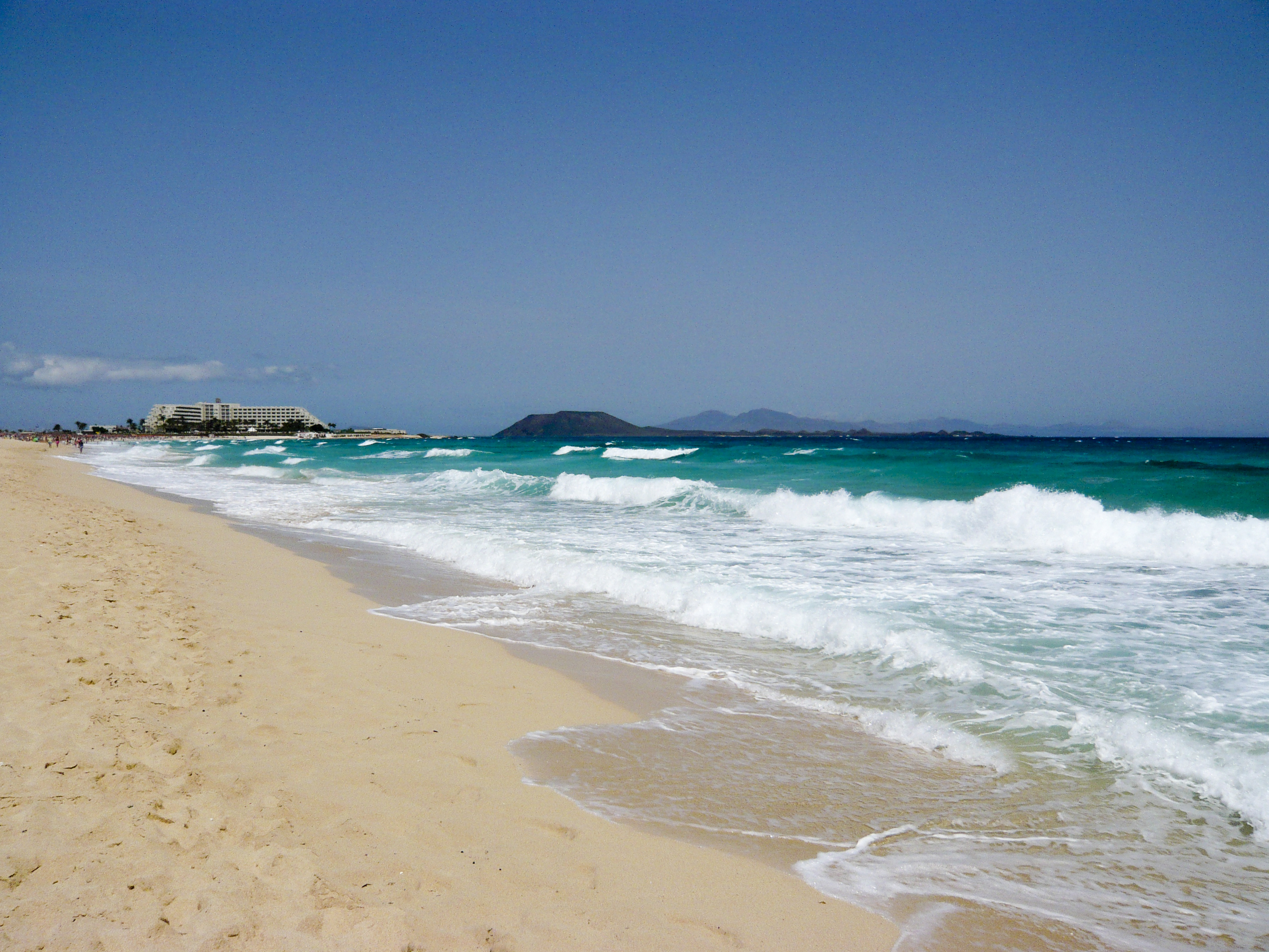 Los Lobos & Lanzarote from beach